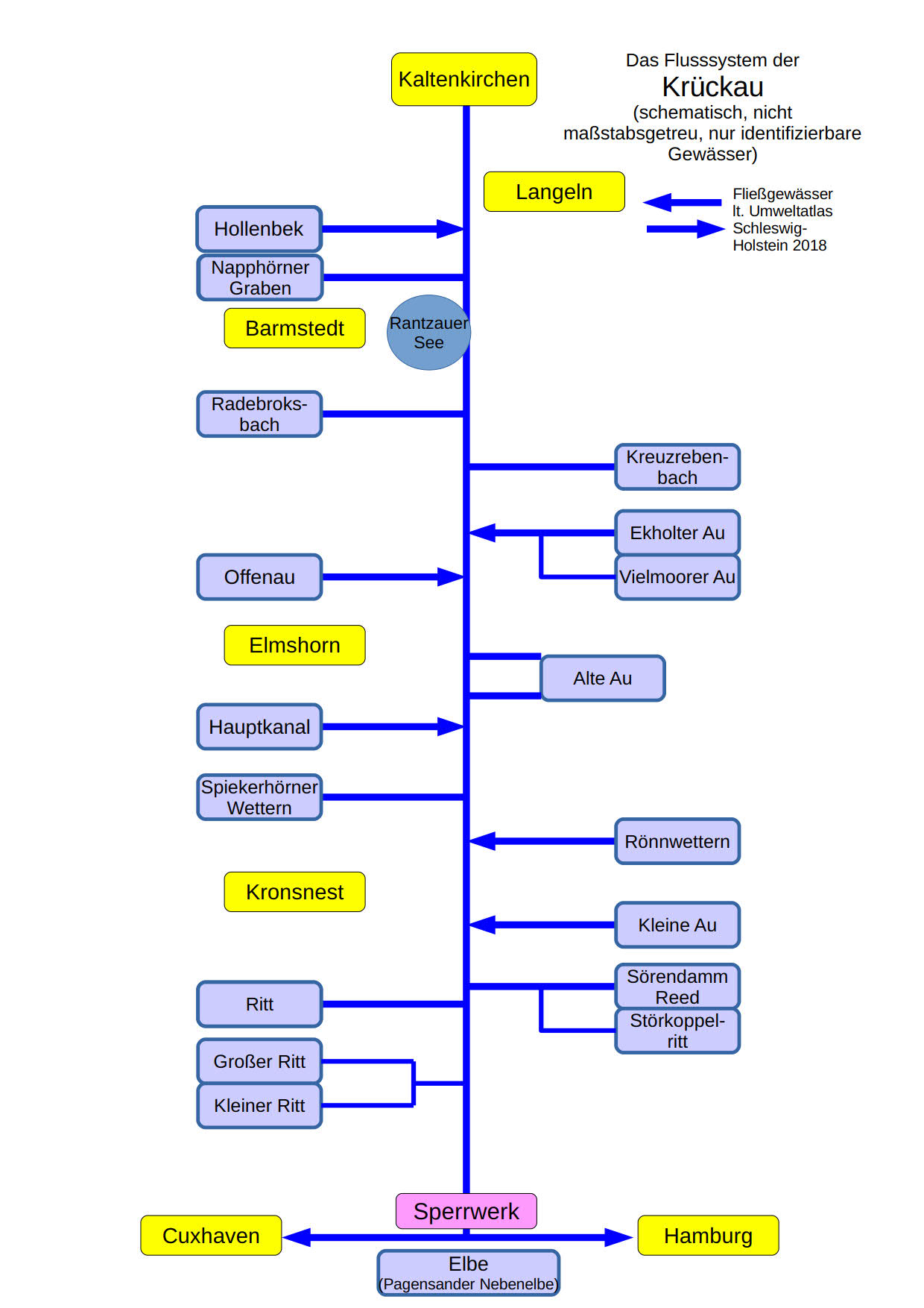 Krückau/schematische Darstellung des Flussystemes